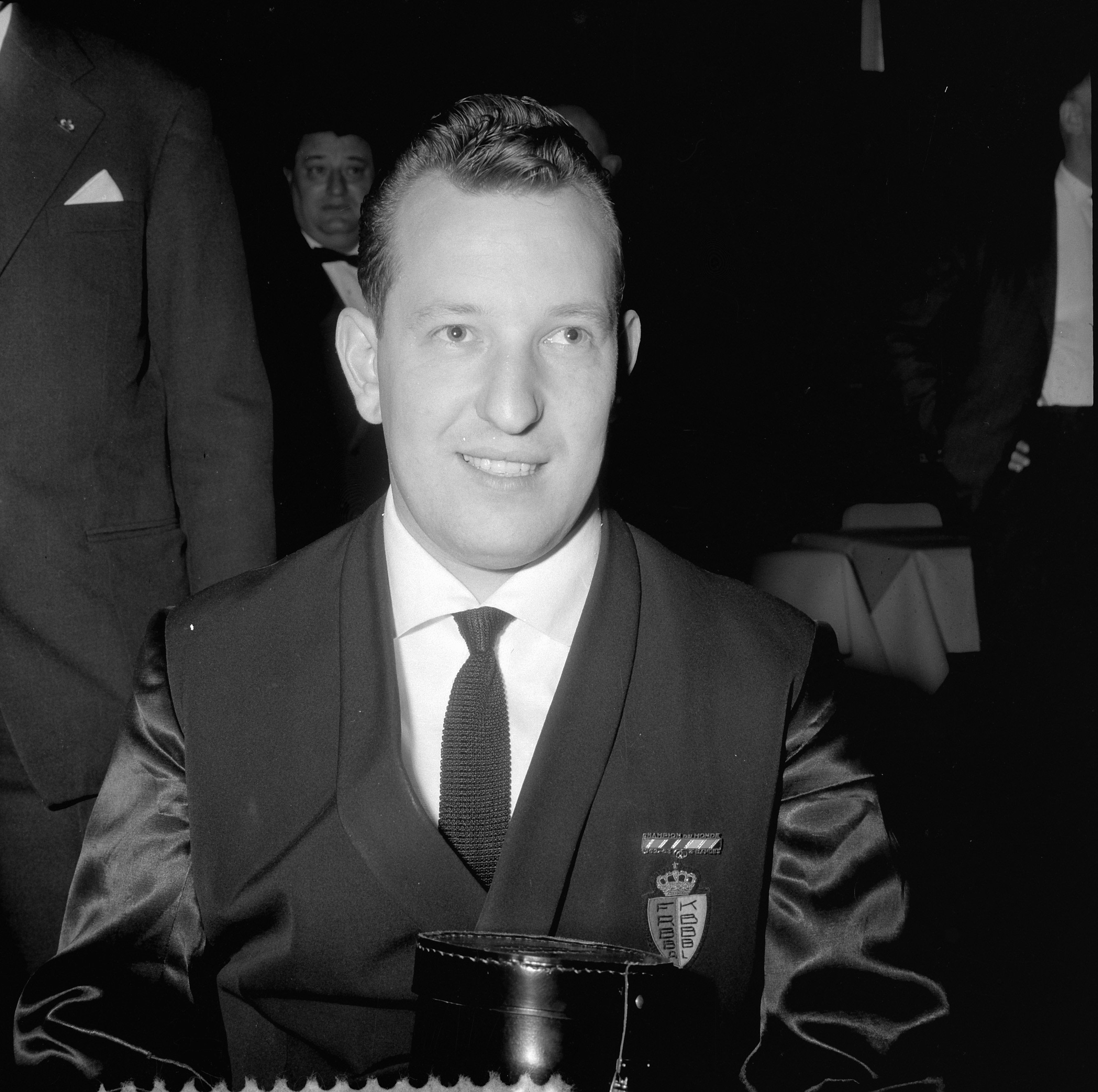 Collectie / Archief : Fotocollectie Anefo Reportage / Serie : [ onbekend ] Beschrijving : Kampioenschappen biljaren in Ostende, koppen Raymond Ceulemans (Belgie) Datum : 4 augustus 1964 Locatie : België, Oostende Trefwoorden : KAMPIOENSCHAPPEN, biljarten Persoonsnaam : Ceulemans, Raymond Fotograaf : Koch, Eric / Anefo Auteursrechthebbende : Nationaal Archief Materiaalsoort : Negatief (zwart/wit) Nummer archiefinventaris : bekijk toegang 2.24.01.03 Bestanddeelnummer : 916-7225